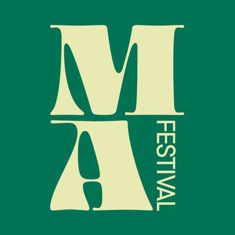 Logo MA Festival 2020